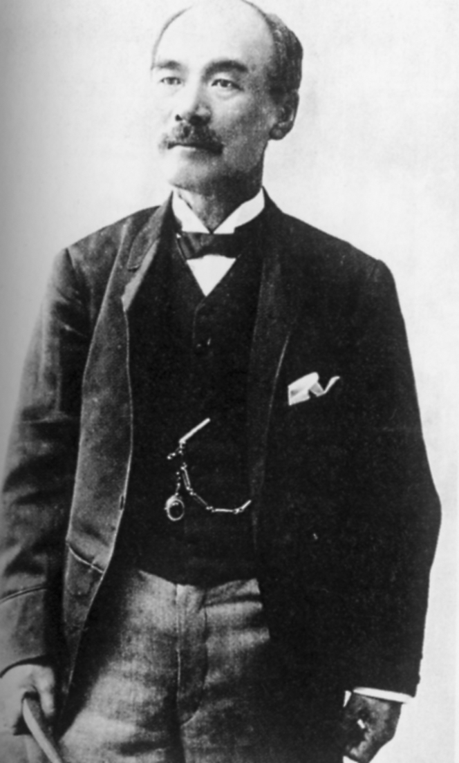 広瀬宰平 Hirose Saihei.明治から大正にかけての実業家。